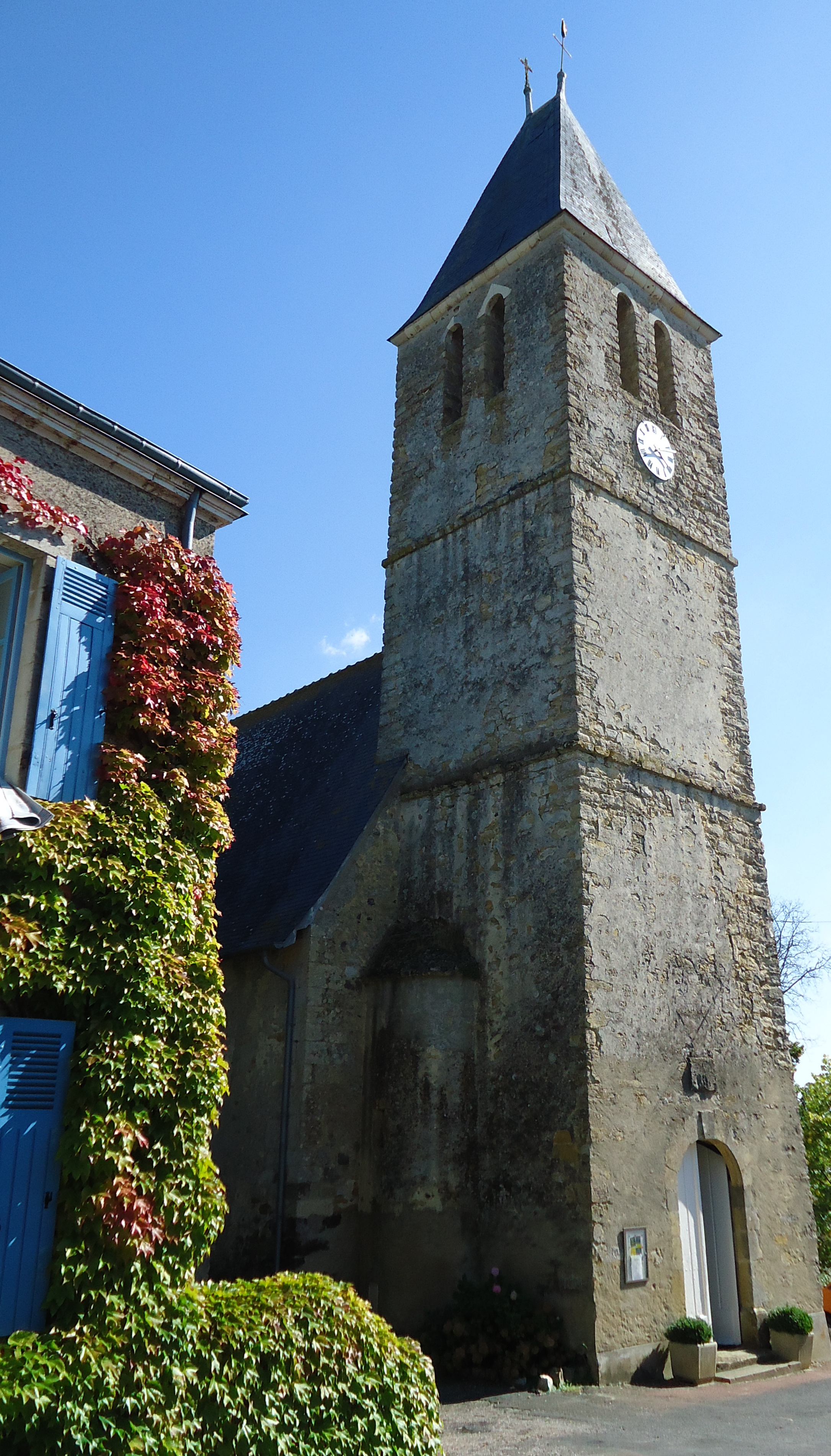 Eglise Saint-Pierre - Fercé-sur-Sarthe - Sarthe (72)